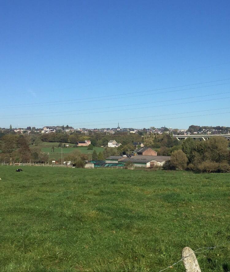 Paysage de la colline de la ville de Herve.